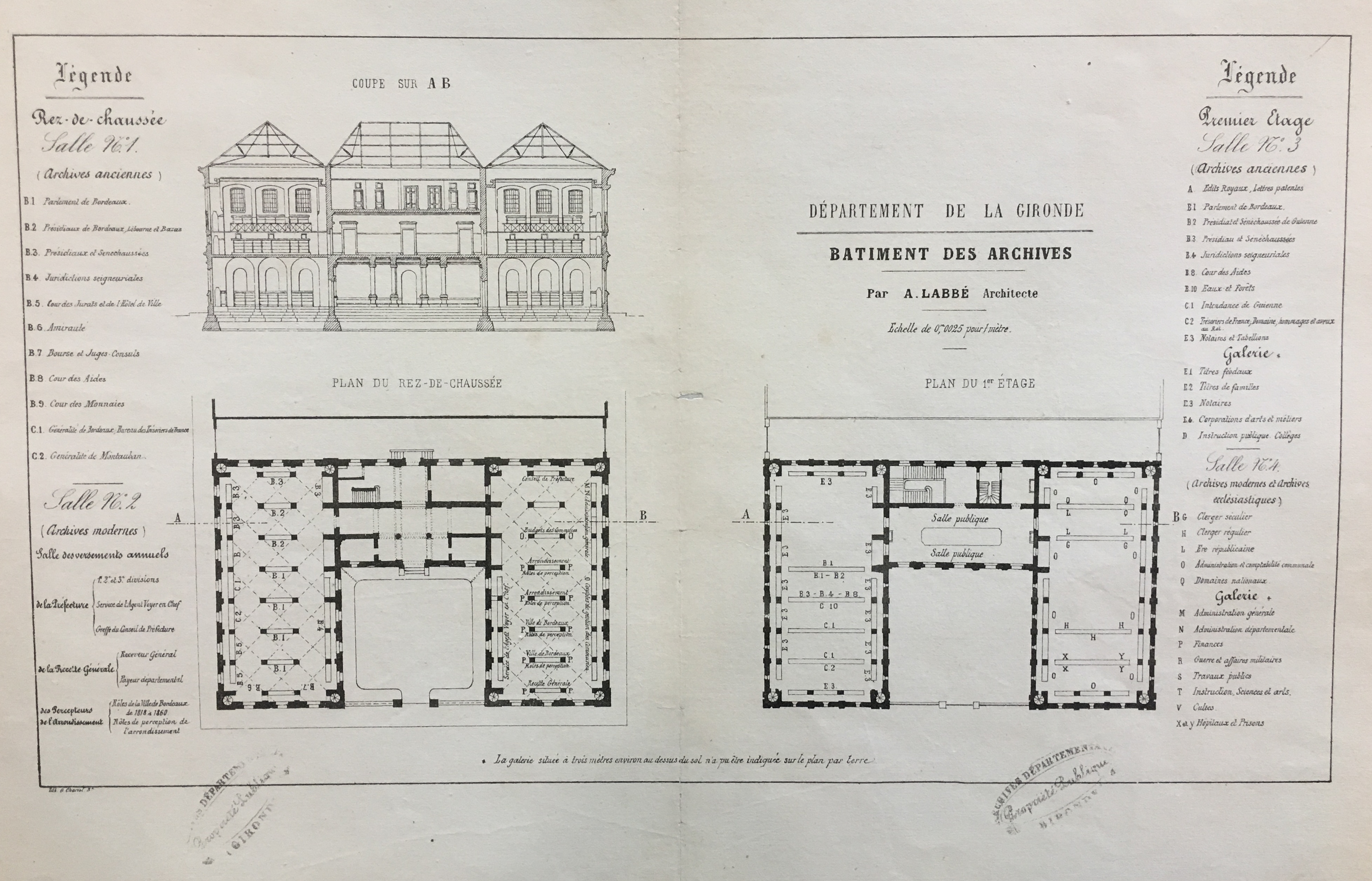 Plan du projet de construction par Pierre-August Labbé : rez-de-chaussée, premier étage et élévation